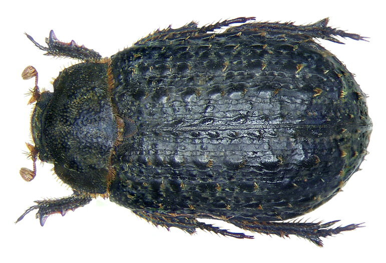 Trox sabulosus (Linné, 1758) Familie: Trogidae Groesse: 8-10 mm Verbreitung: Europa Ökologie: an tierischen Resten, besonders in sandigen Gegenden Fundort: Germania, Bayern, Unterfranken, Winterhausen leg.det. H.J.Mager, 1973 Photo: U.Schmidt, 2007